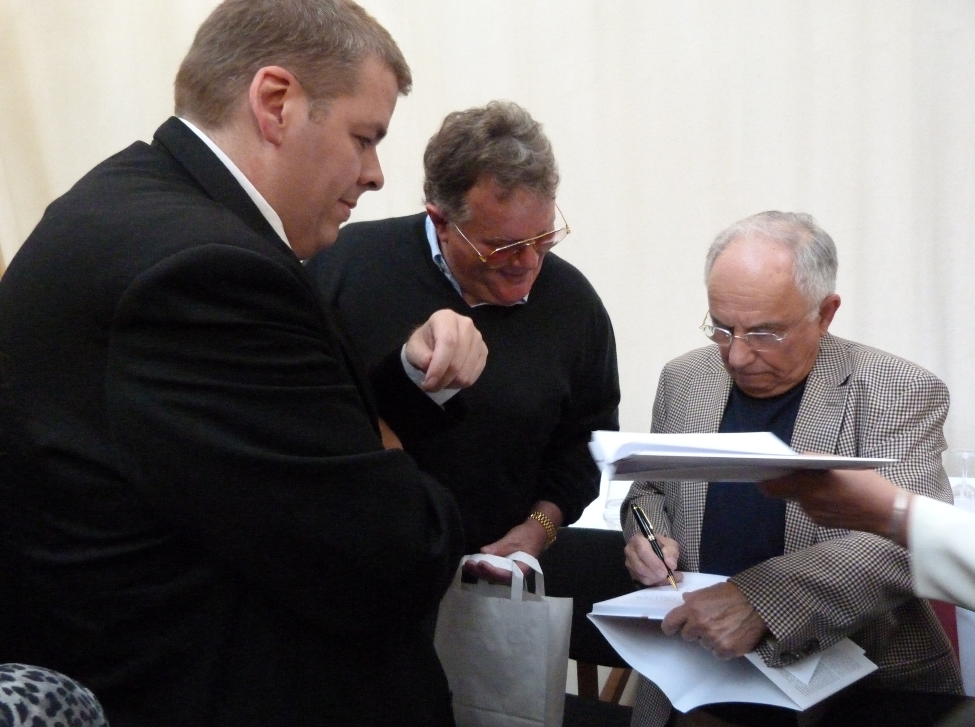 XIX. Budapesti Nemzetközi Könyvfesztiválon (2012. április 19 –22). Vitray Tamás, Juszt László, Schmuck Andor. A felvételek megjelentek Creative Commons alatt a Metapolisz DVD sorozatban.